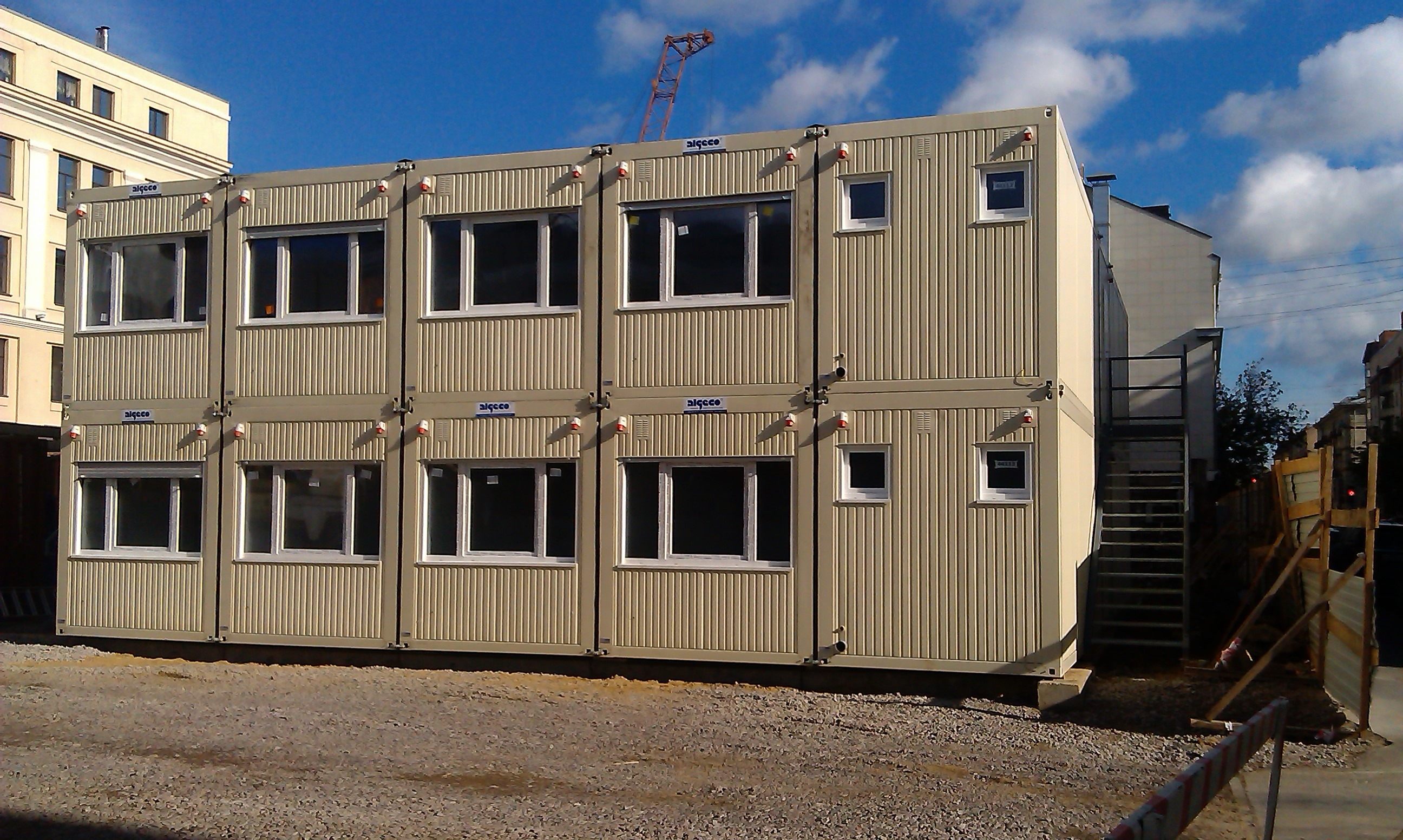 Модульное здание